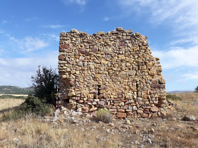 Torre de la Calderuela (Foto MSM)